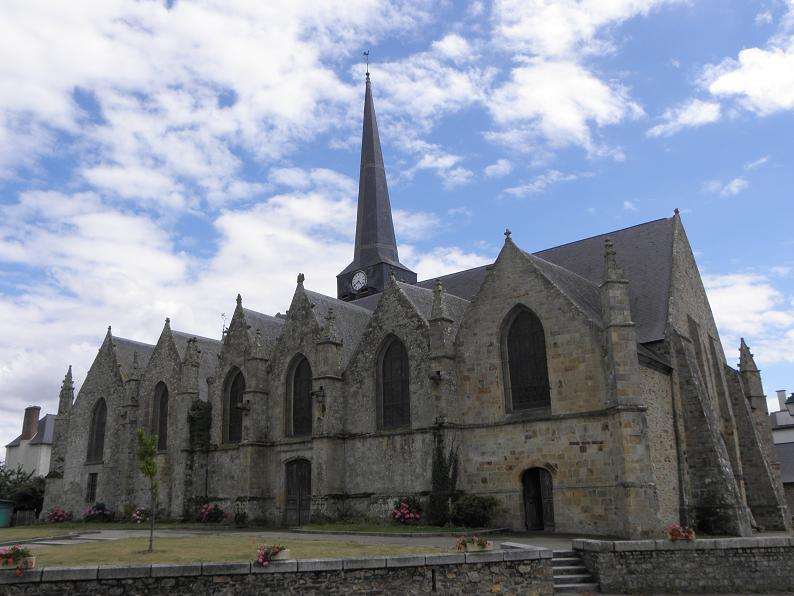 Façade septentrionale de l'église de Rannée (35).